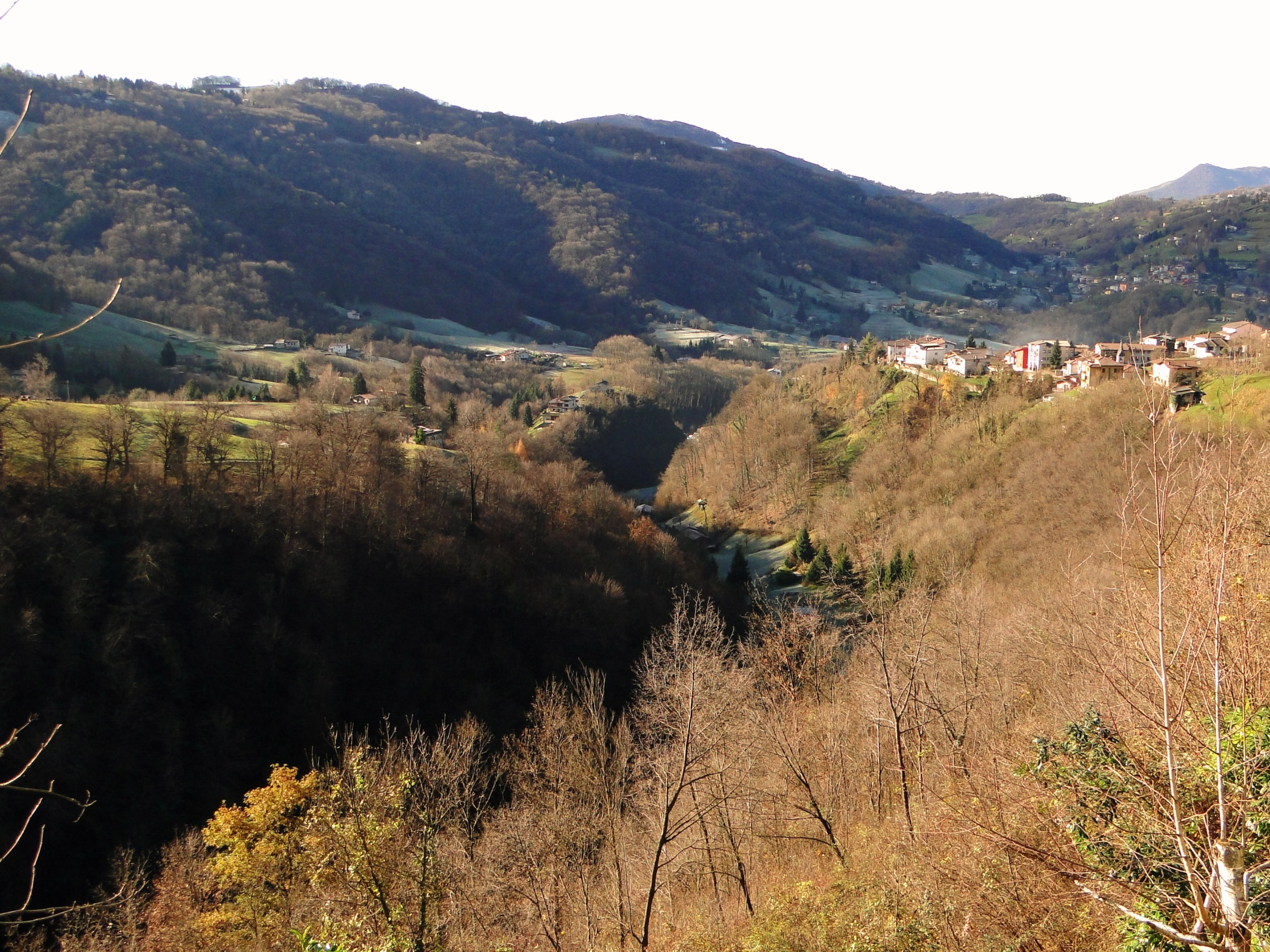 Val Vegia. Peia (BG). Italy